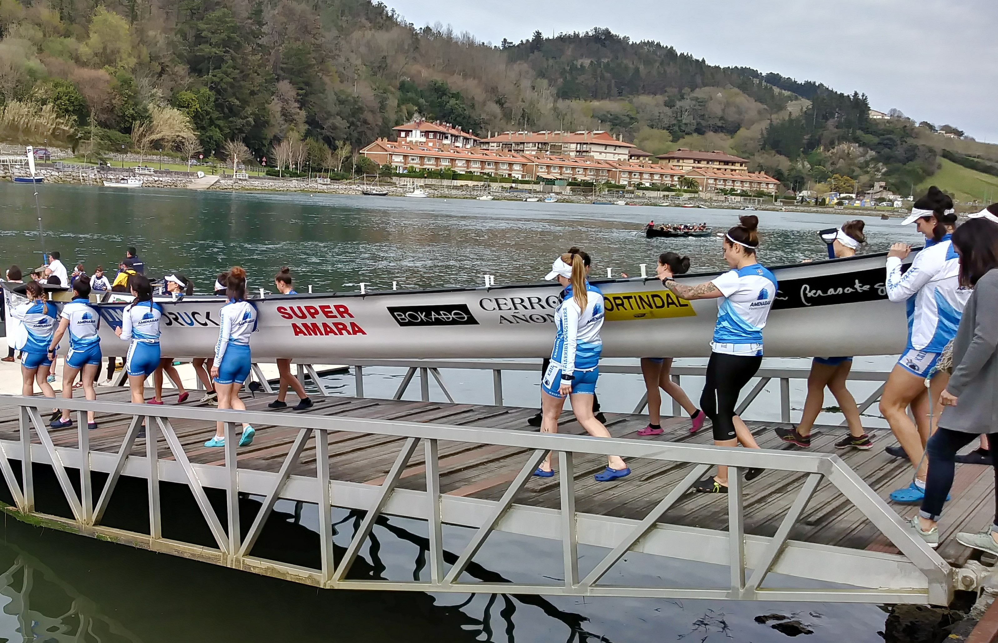 Donostiarrako emakumezkoen traineruko arraunlariak, 2019ko Oriako Traineru Jaitsieran